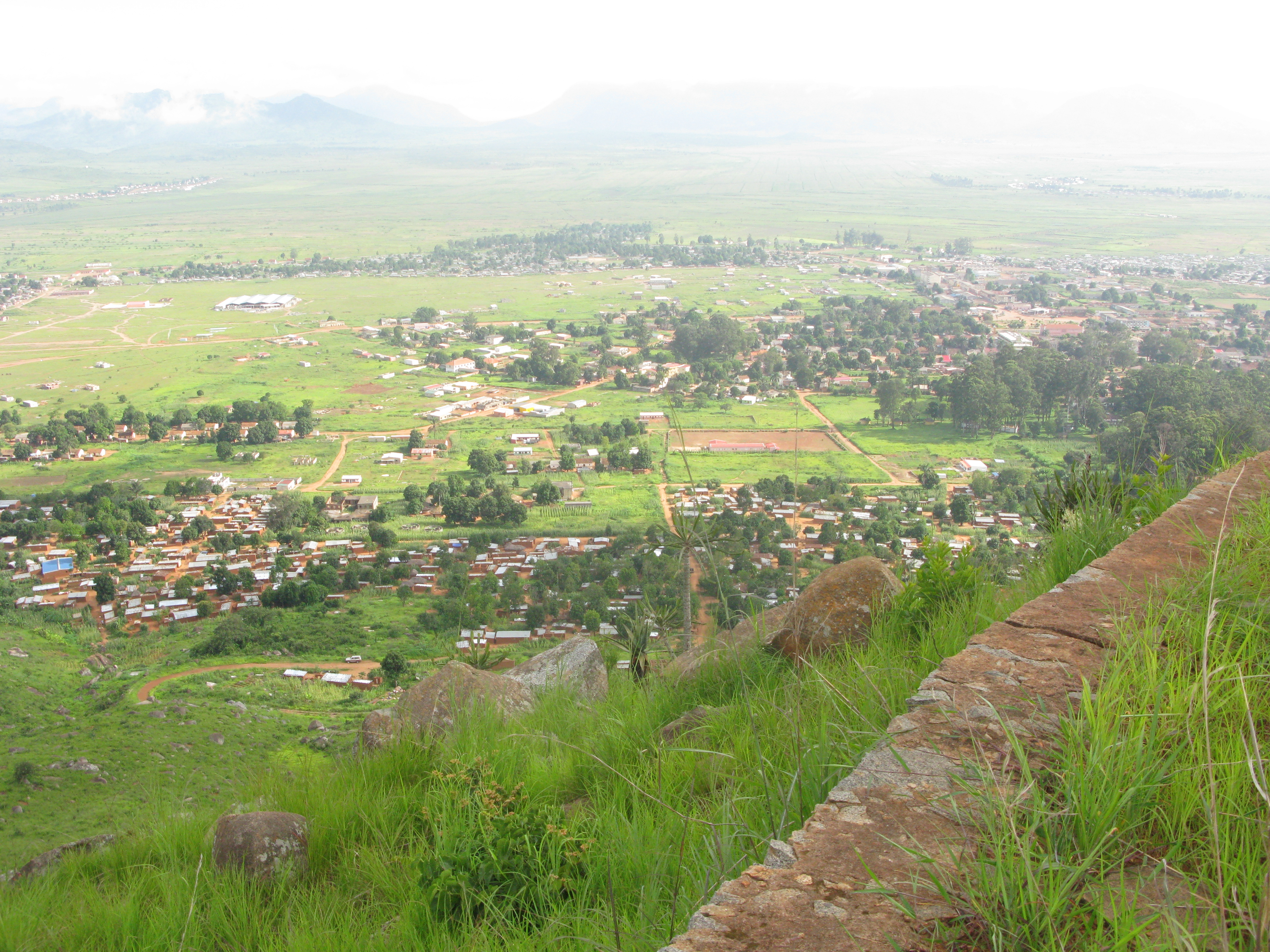 Waku Kungu